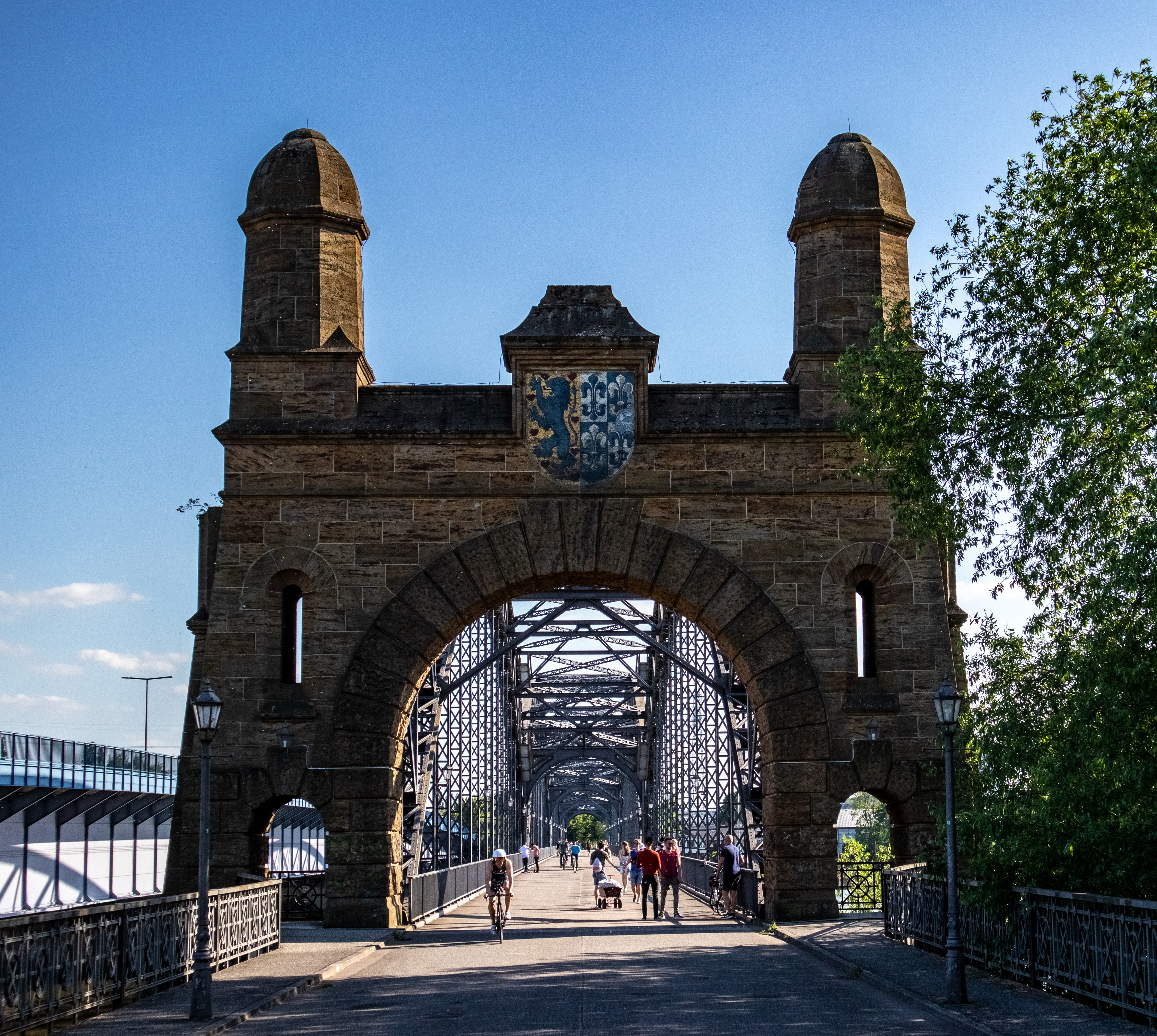 Wilhelmsburger Portal der Alten Harburger Elbbrücke